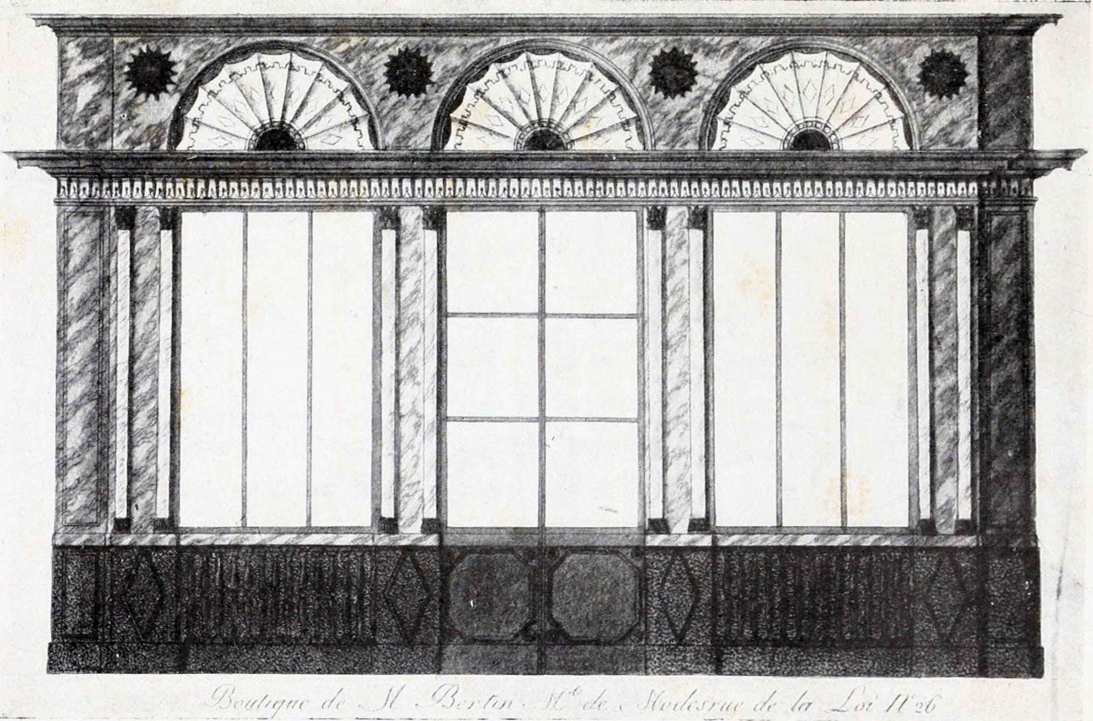 Aspect extérieur de la Maison Bertin au N° 26 de la rue de la Loi à Paris.